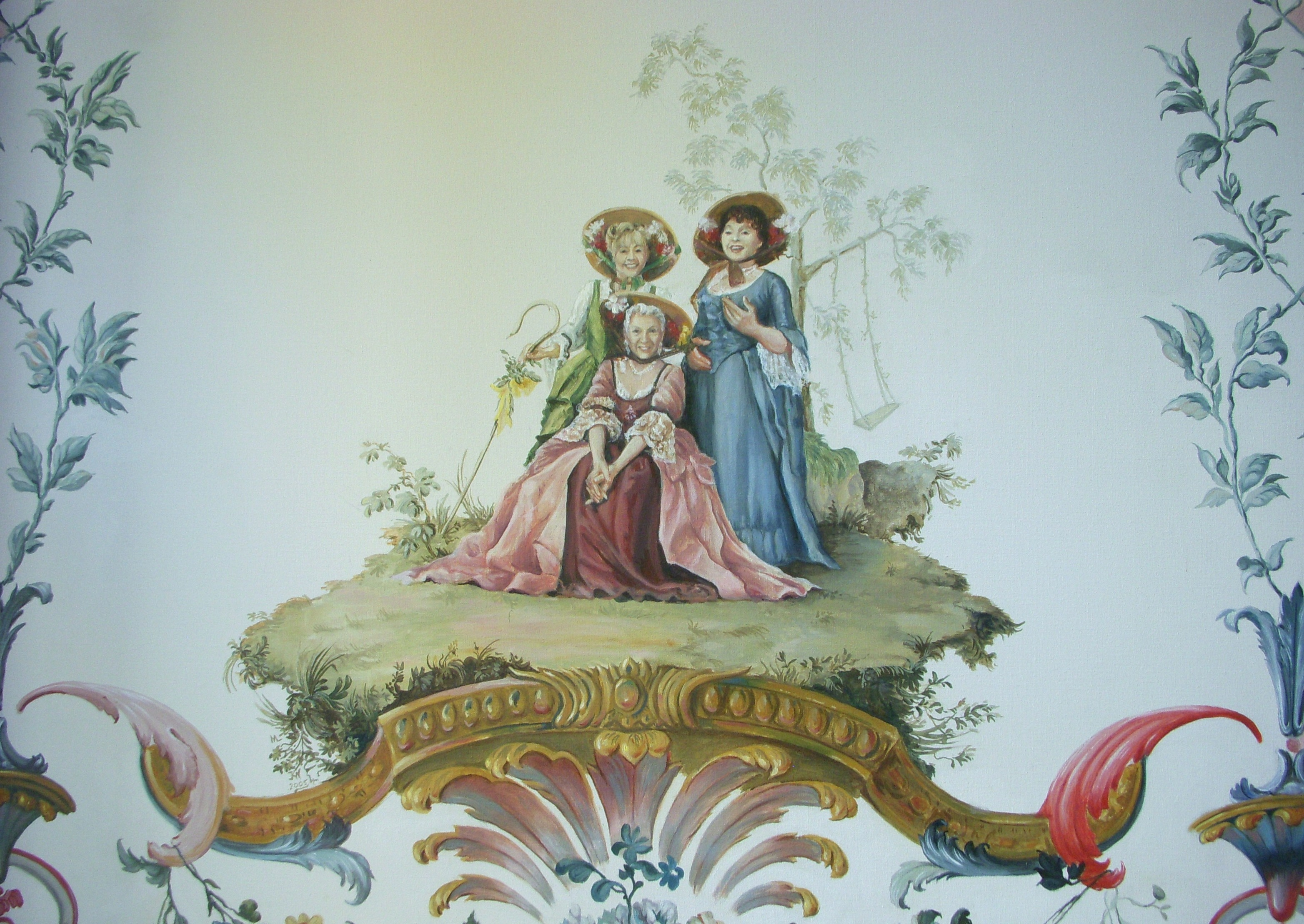 Ulriksdals slottsteater, tapetmotiv i miniatyr med Lena Nyman, Elisabeth Söderström och Kjerstin Dellert